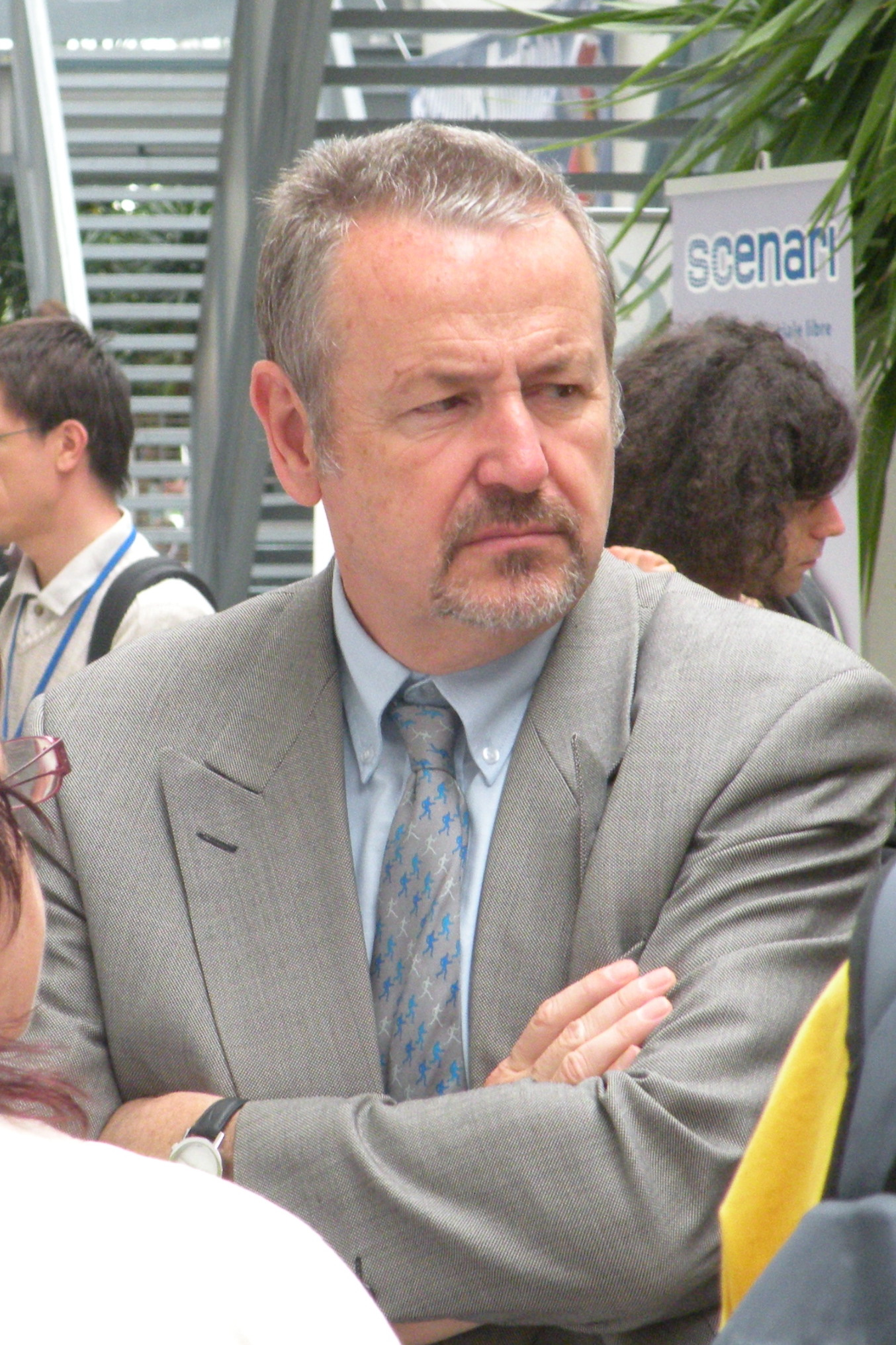 Dominique Raimbourg, député de la quatrième circonscription de la Loire-Atlantique, lors des Rencontres mondiales du logiciel libre 2009 à Nantes.